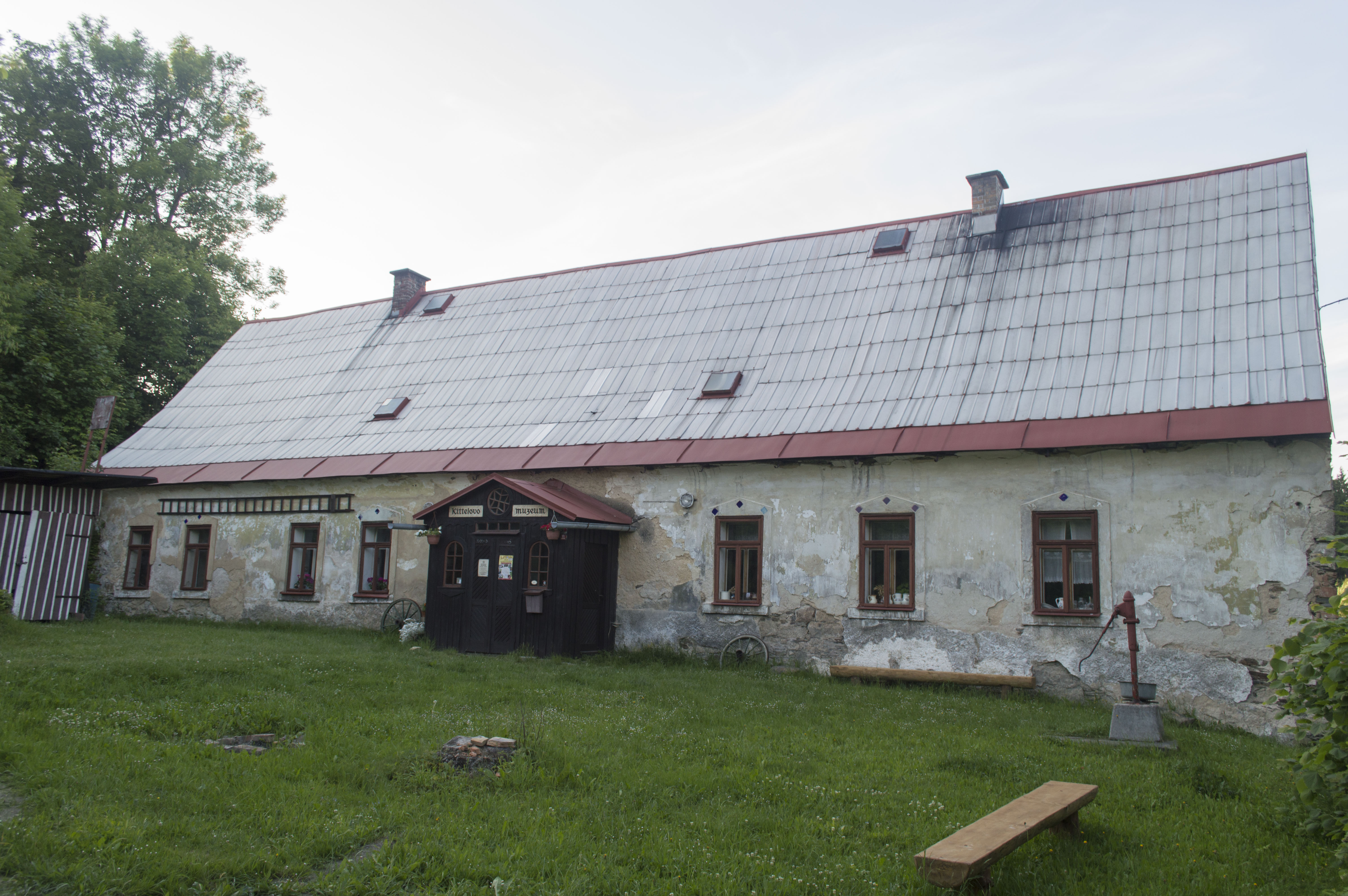 Krásná, součást obce Pěnčín. Kittelovo muzeum.